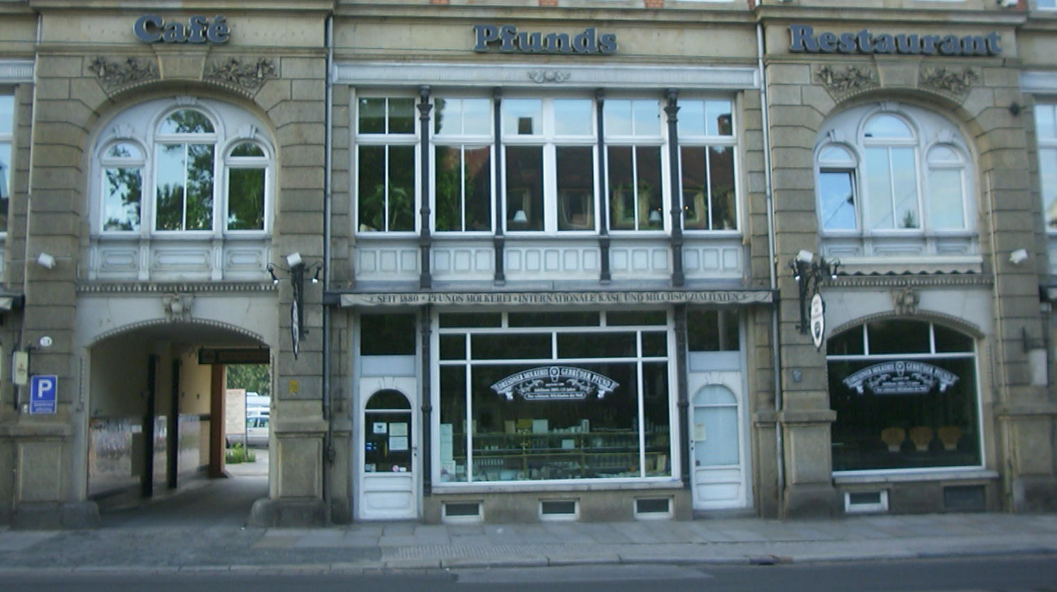 Blick auf Pfunds Molkerei (WP) in Dresden